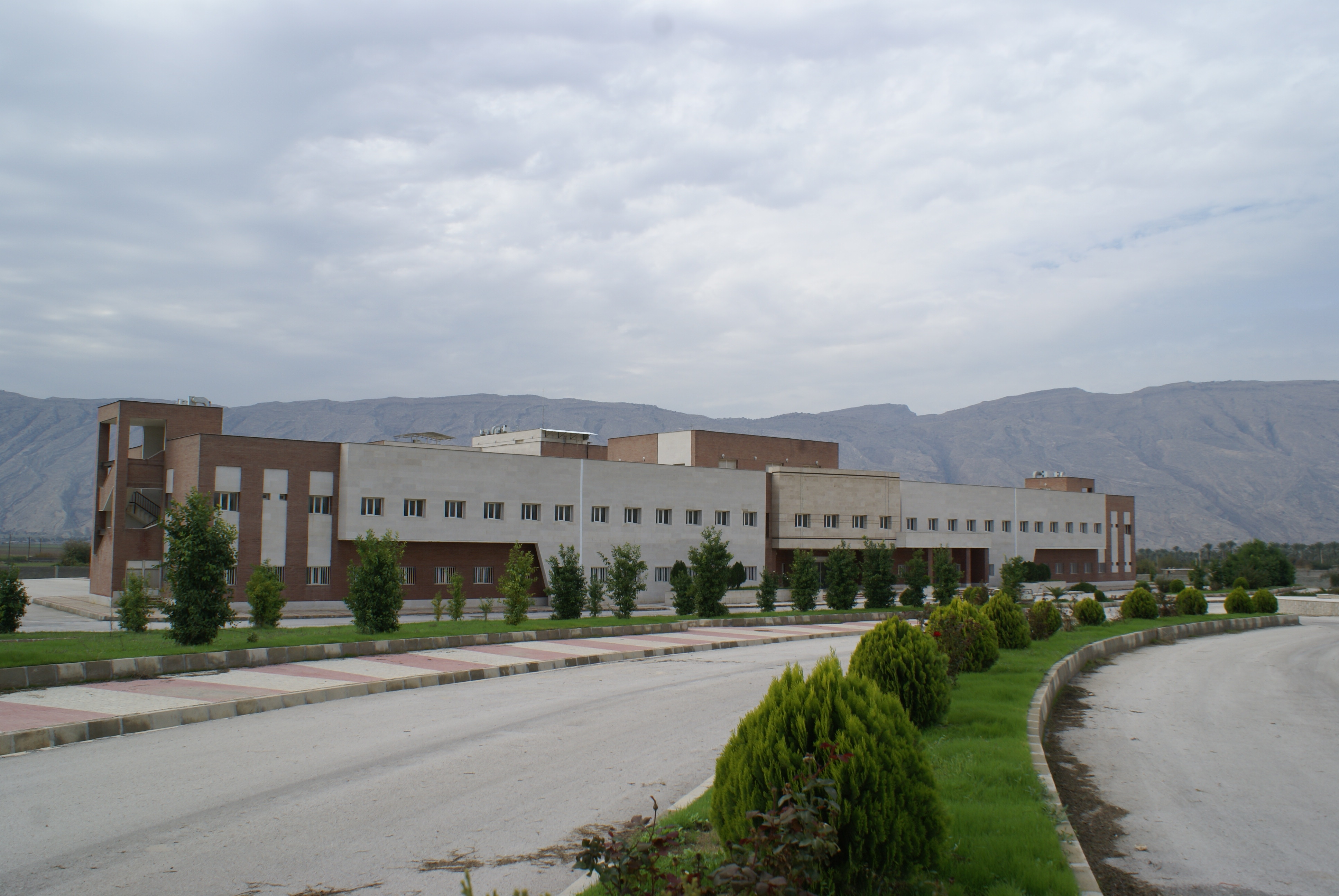 مجتبی بهره‌دار